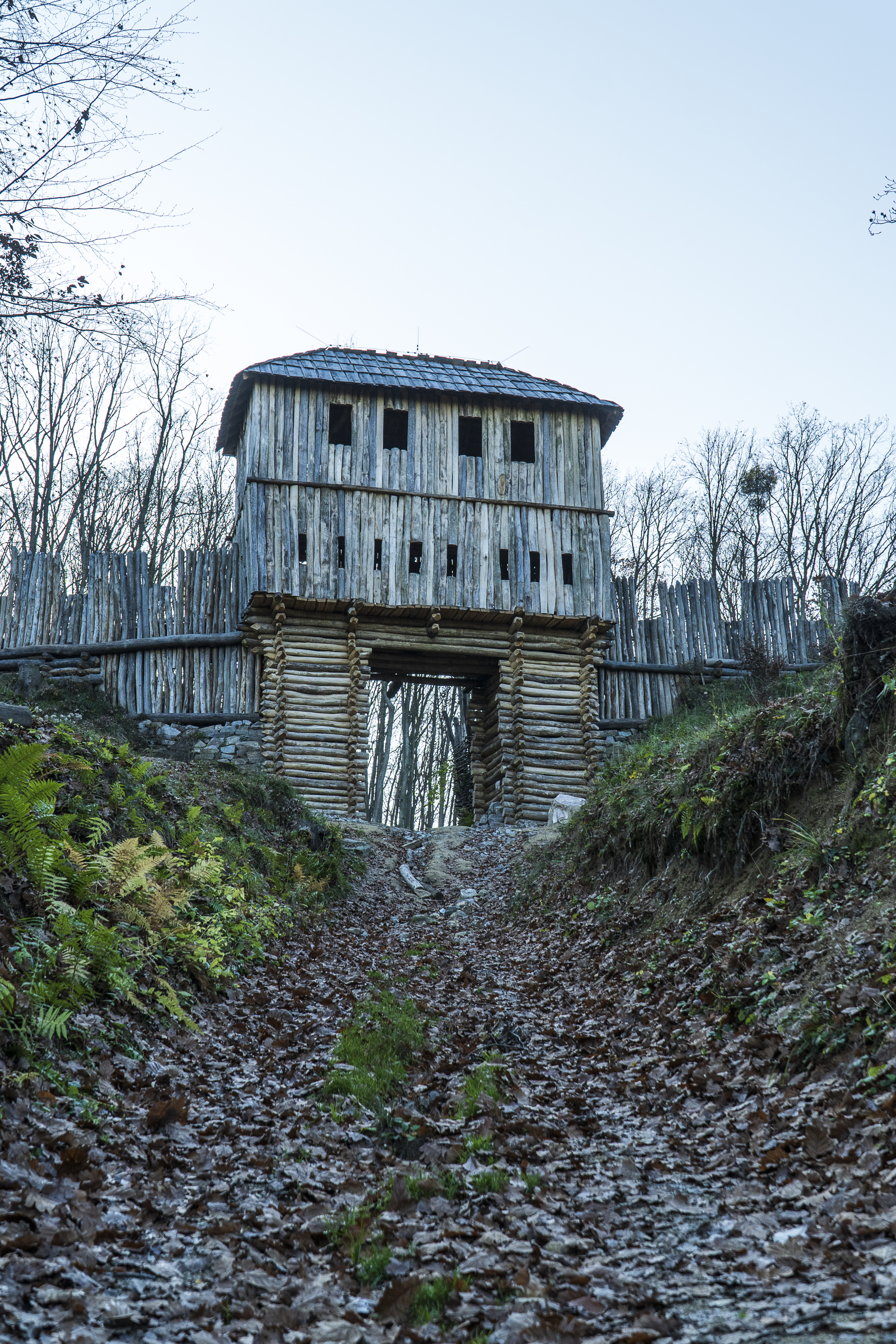 Replika brány na slovanskom hradisku Valy I. pri obci Bojná.